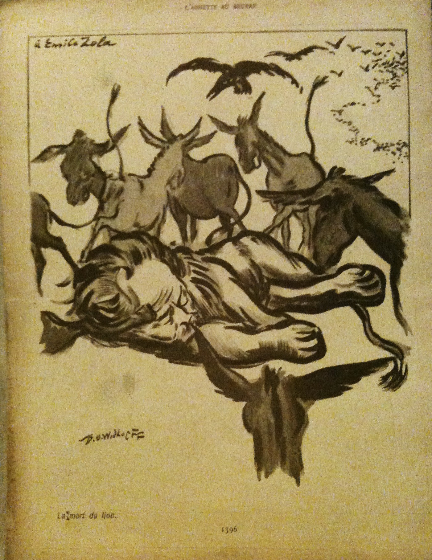 Dernière page de L'Assiette au beurre spécial « La Toussaint » par D. O. Widhopff (n° 83, 1er novembre 1902). Image dédiée à Émile Zola, ici entouré d'ânes et survolé par des corbeaux charognards, légendée : « La mort du lion ».